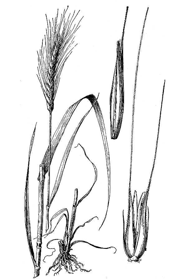 Rye (secale cereale)